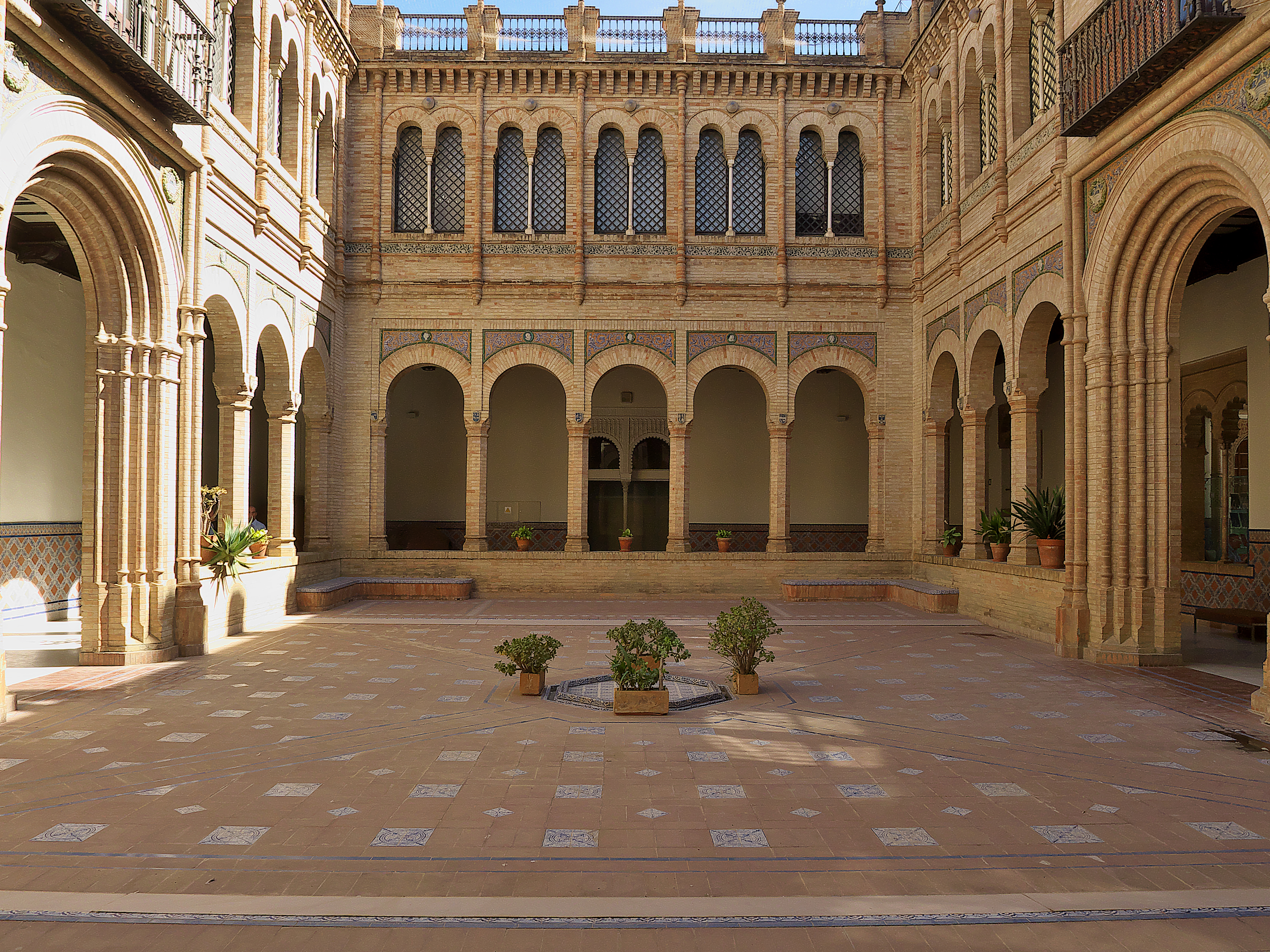 Aníbal González, 1914